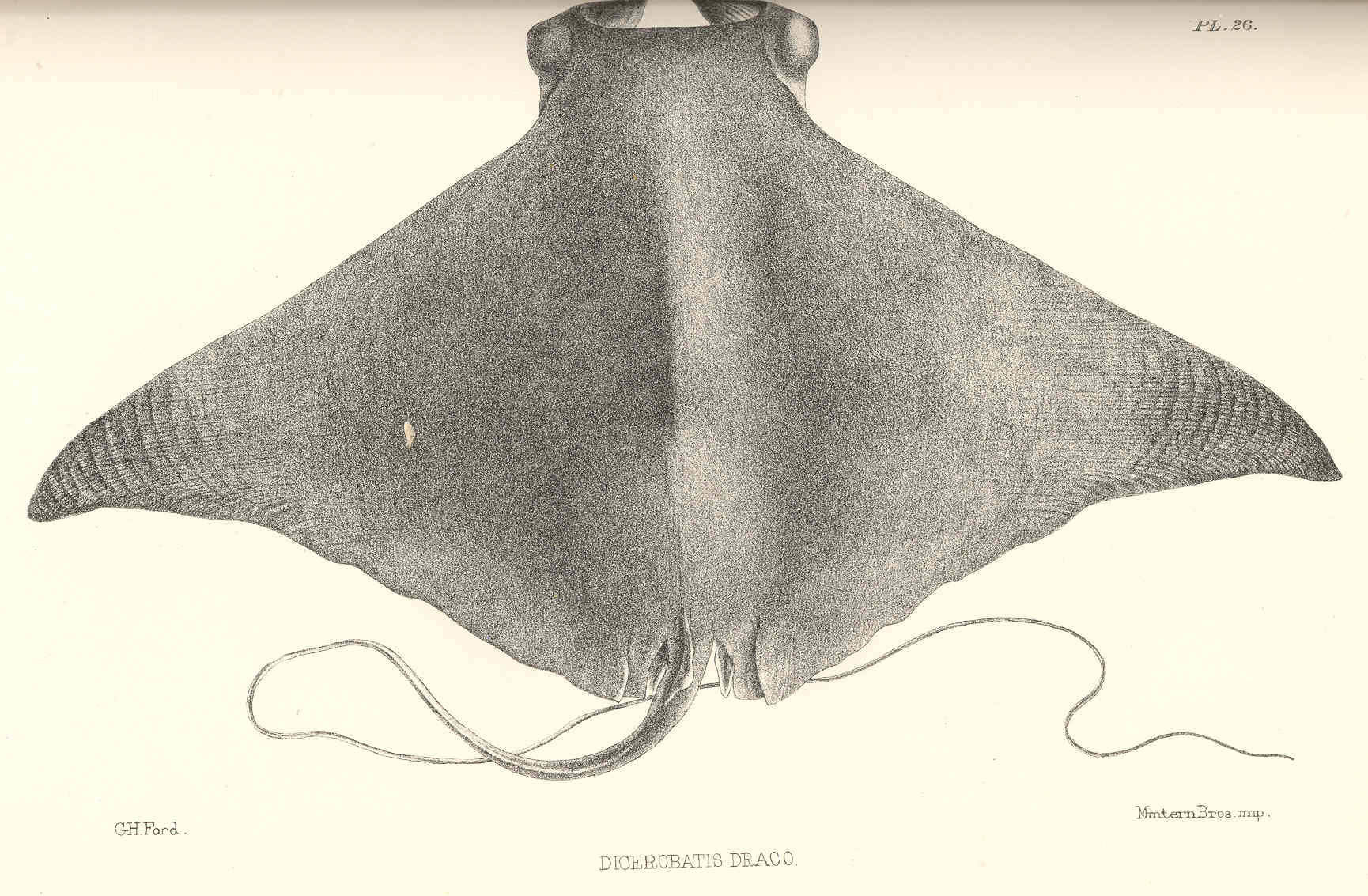 Скат рода мобул Mobula kuhlii syn. Dicerobatis draco